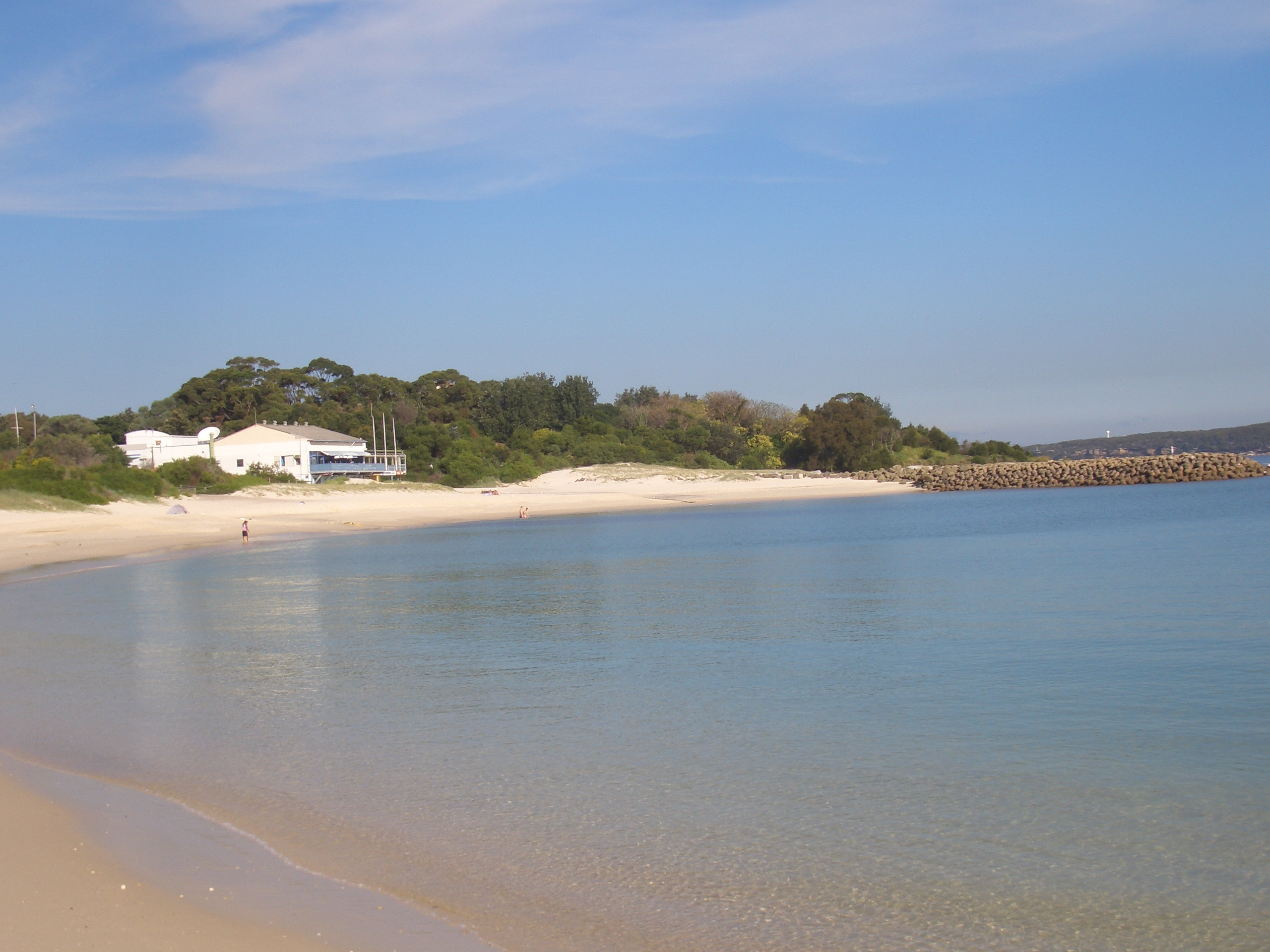 Yarra_Bay at Phillip_Bay